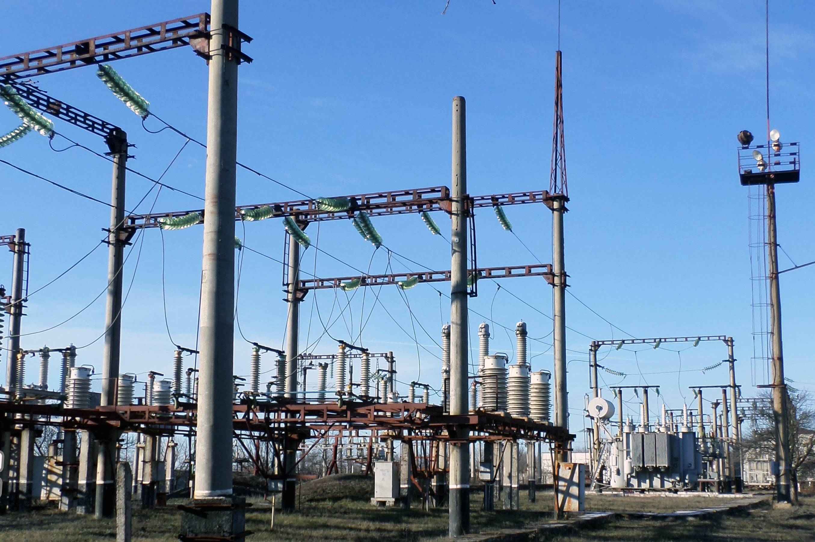 Source = Own work | Author = Eugene Zvarich